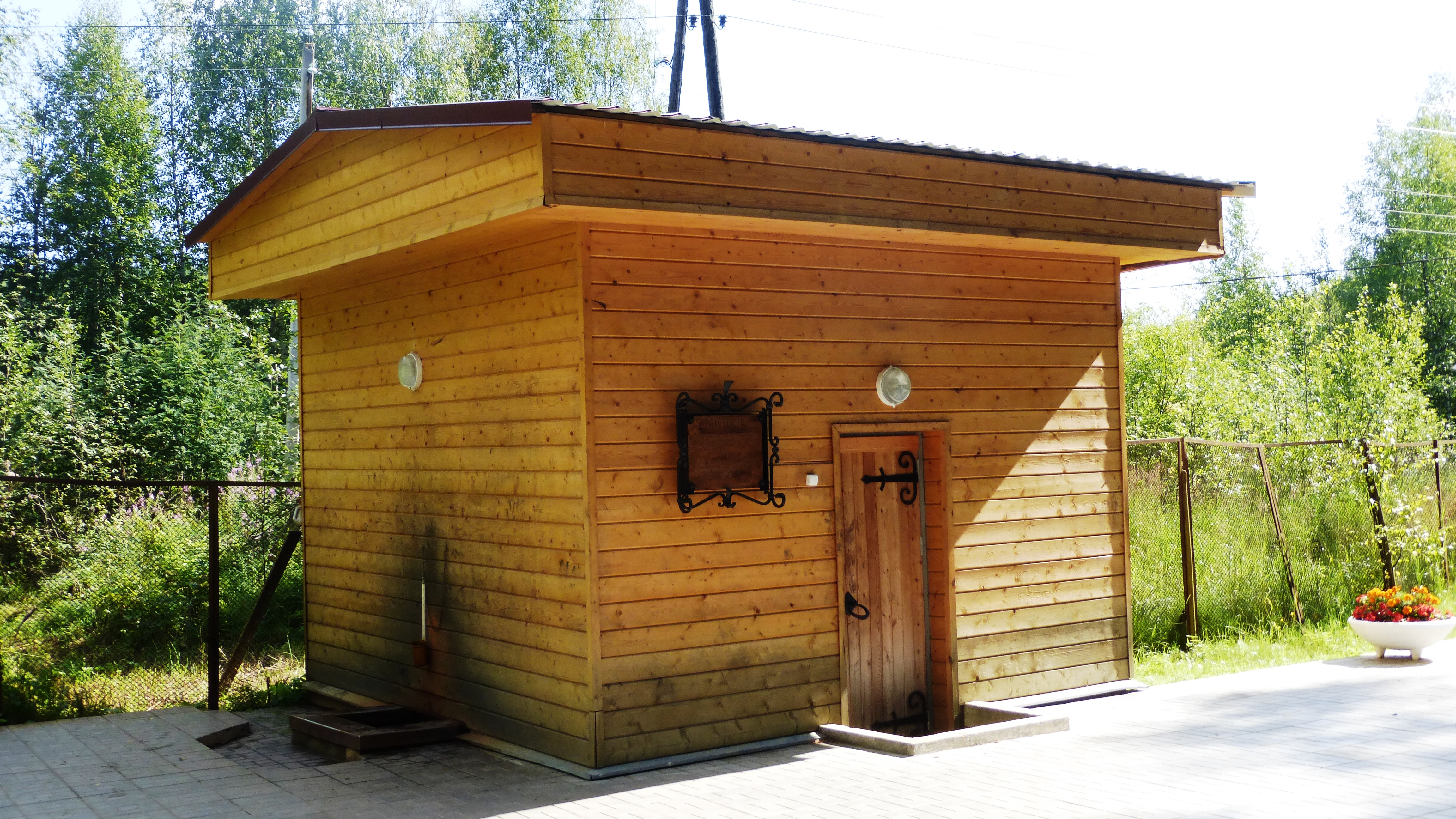 Одна из скважин минеральной воды в посёлке Марциальные Воды Кондопожского района Республики Карелия